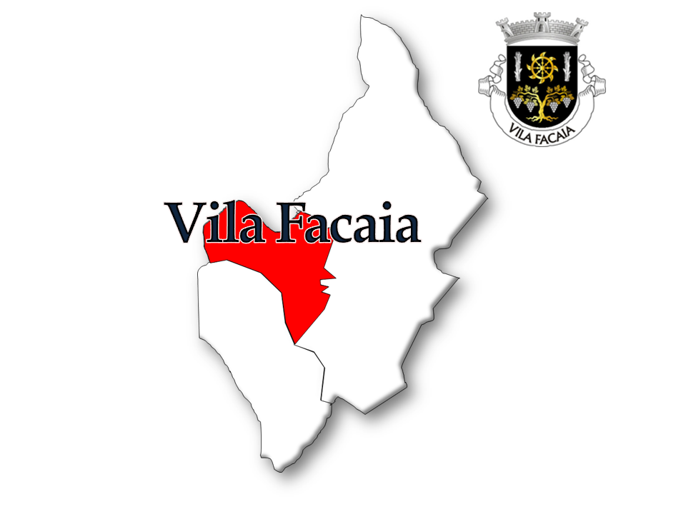 Evolução da População